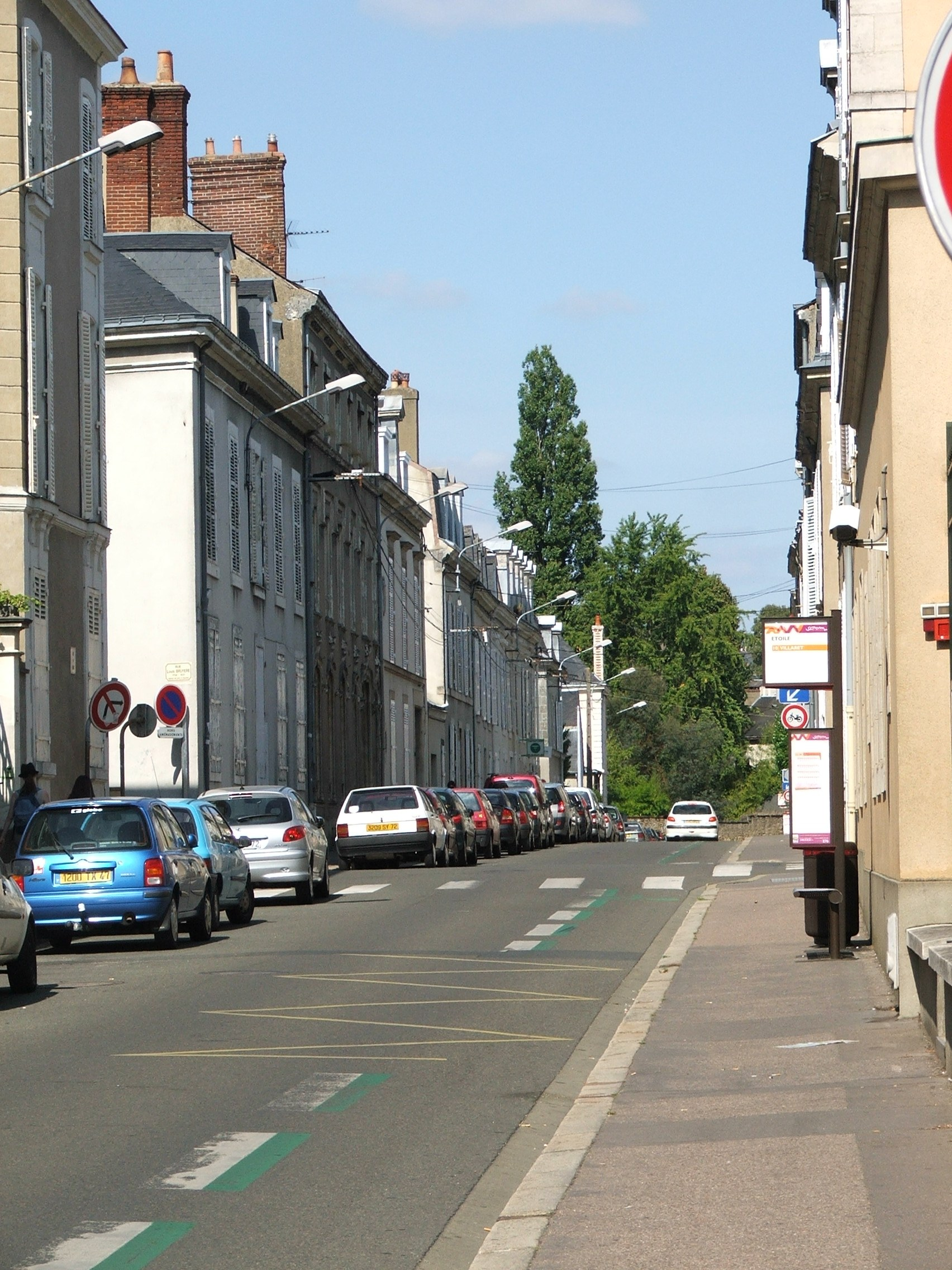 La rue des Arènes au Mans, nom repris du monument gallo romain enfouit sous la voirie actuelle.